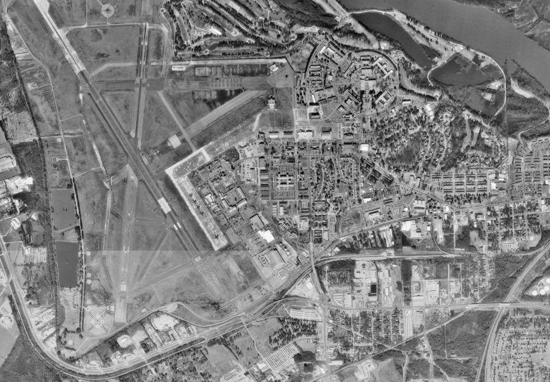 Maxwell AFB, Alabama